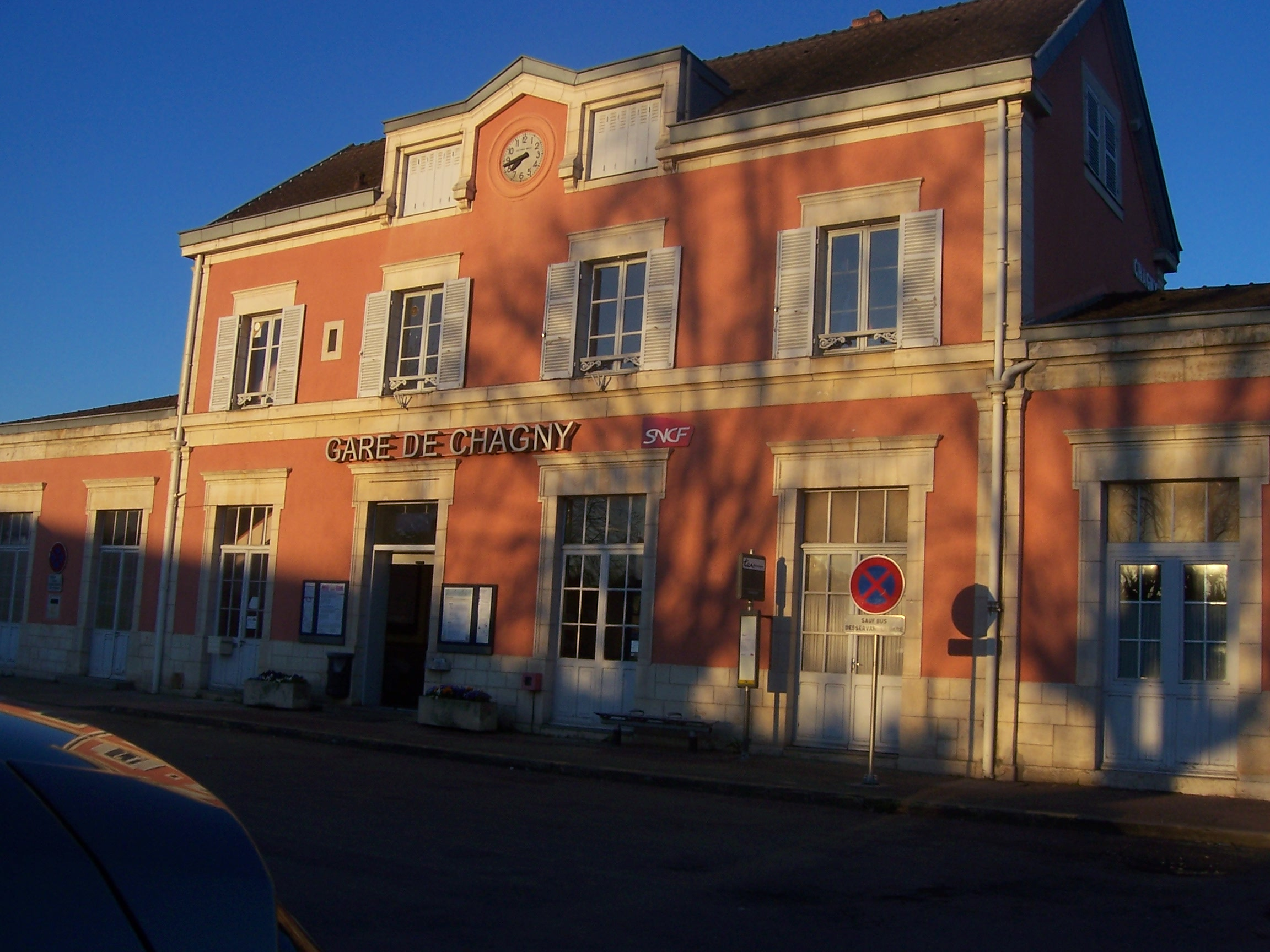 Gare de Chagny